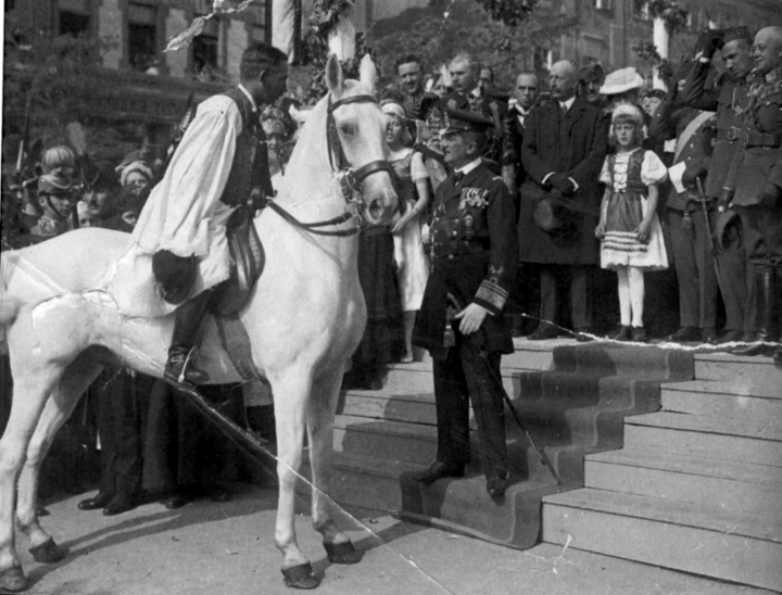 Horthy Pécsett 1921 őszén